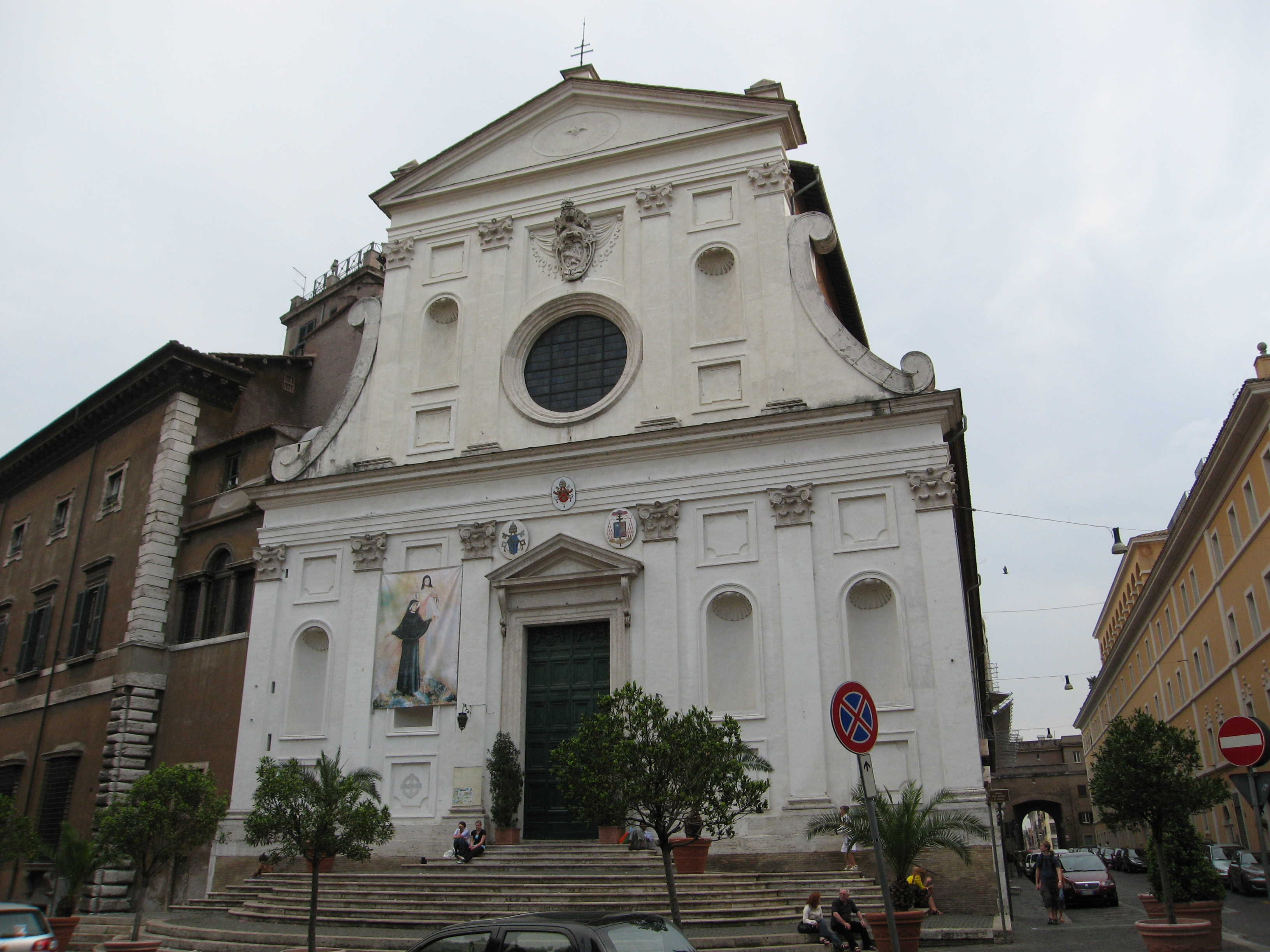 Chiesa de s. Spirito in Sassia, Rione XIV Borgo, Roma, Lazio, Italy